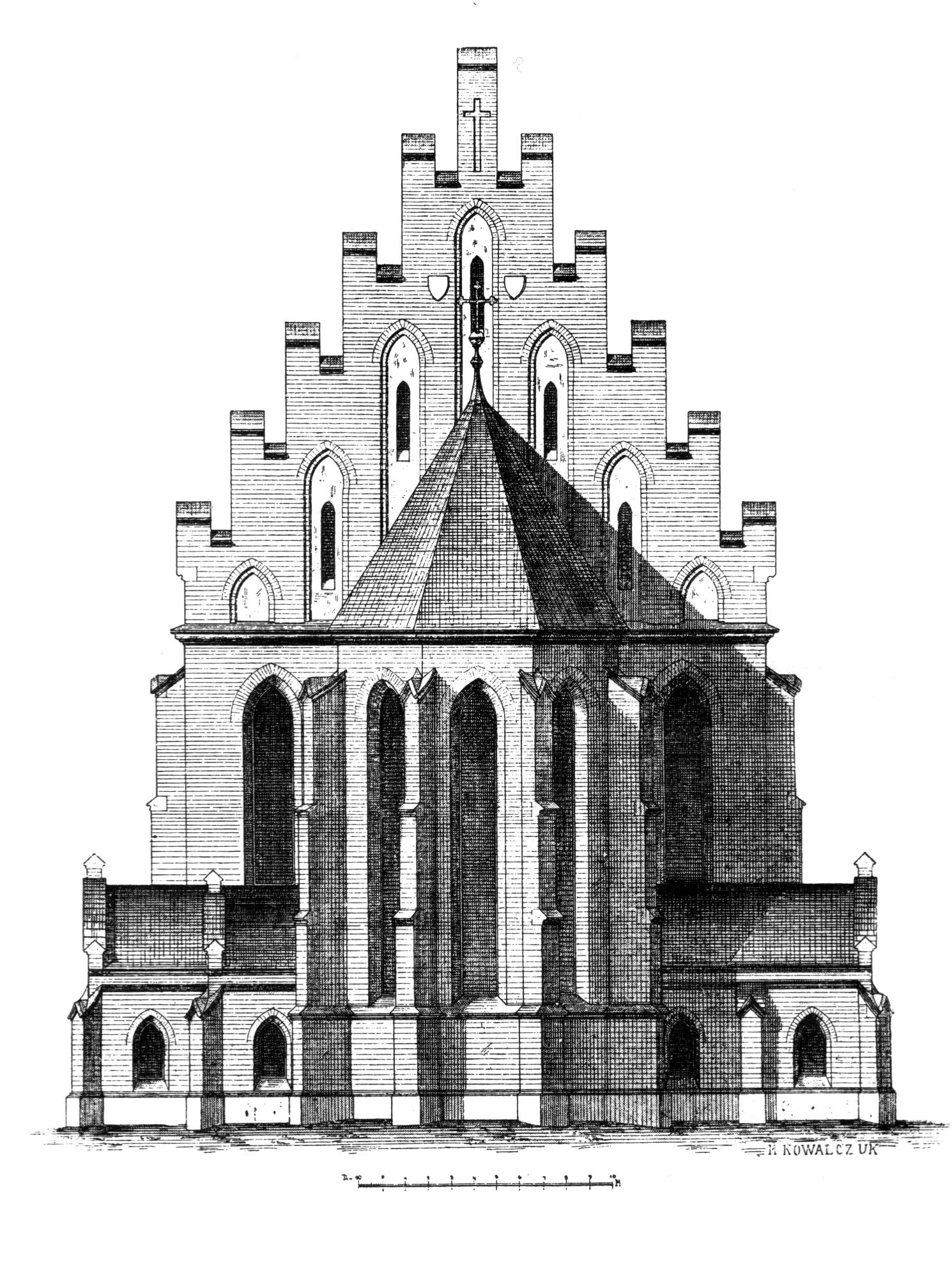 Графічна реконструкція первісного вигляду латинської катедри у Львові. Автор Міхал Ковальчук (1855-1938).